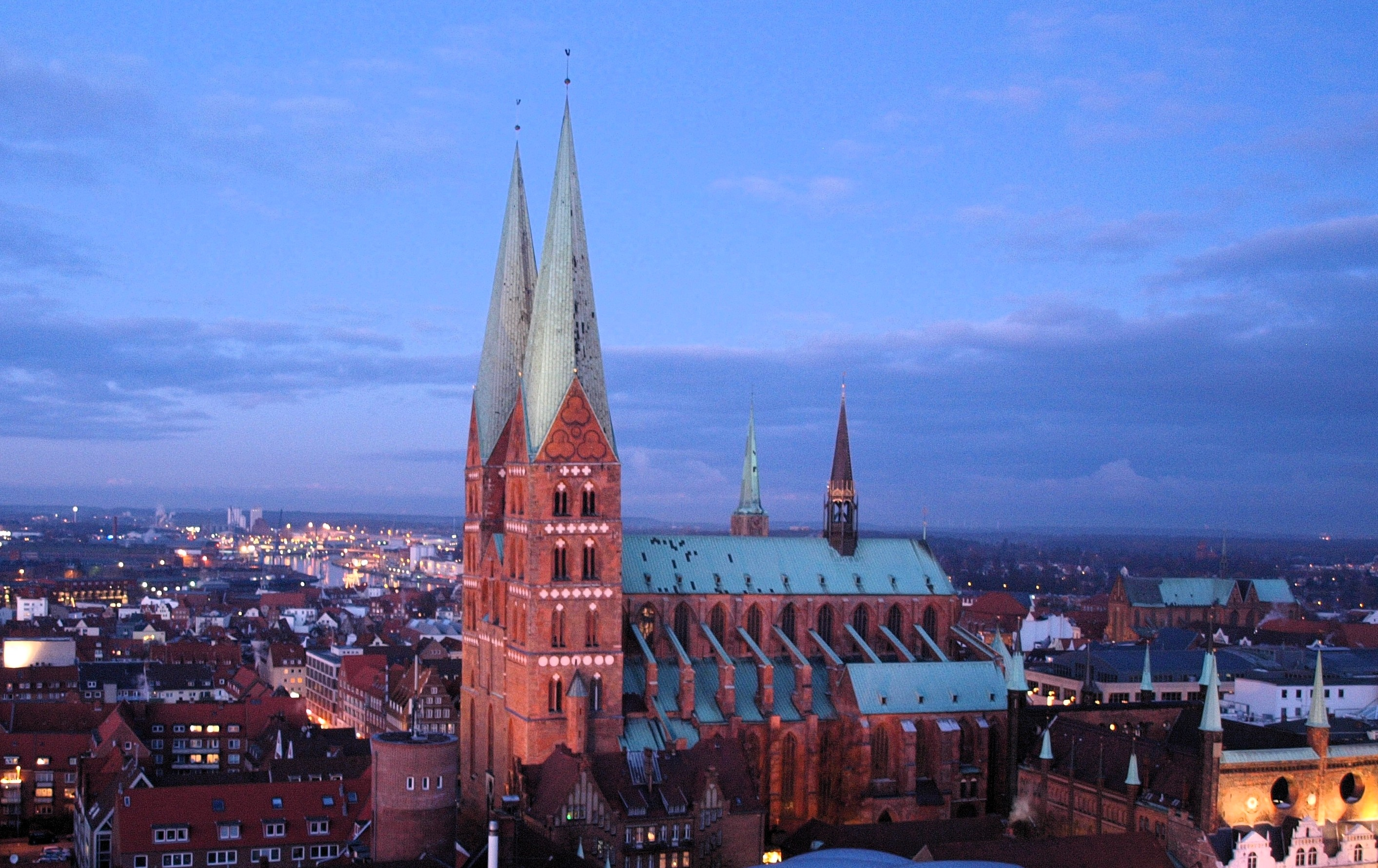 Blick vom Turm der Petrikirche über die Altstadt